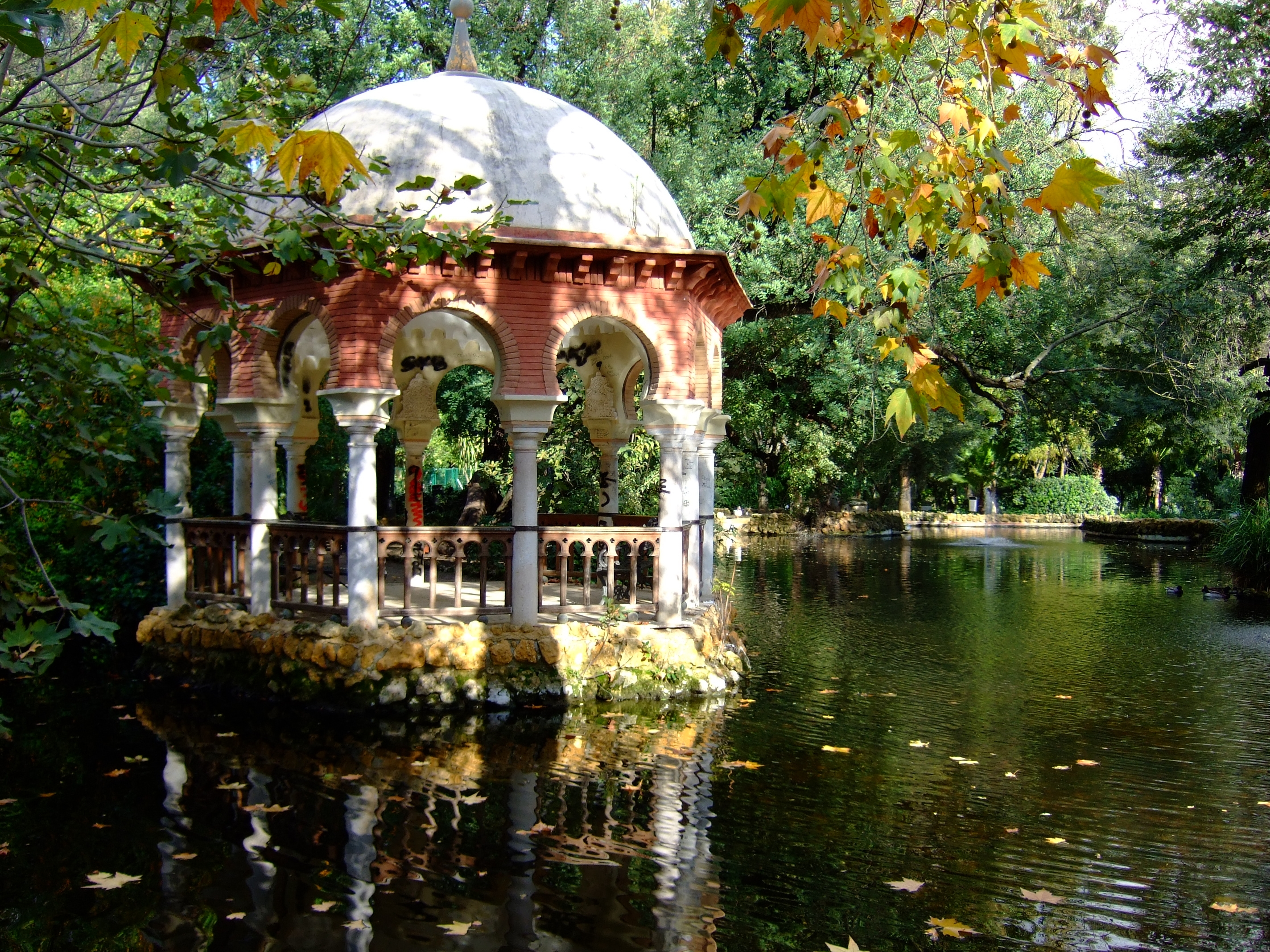 Jardín de El Parque de María Luisa